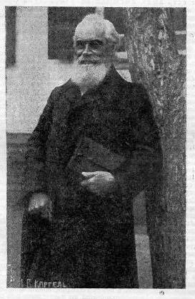 Баптистский богослов Иван Вениаминович Каргель (1849-1937)